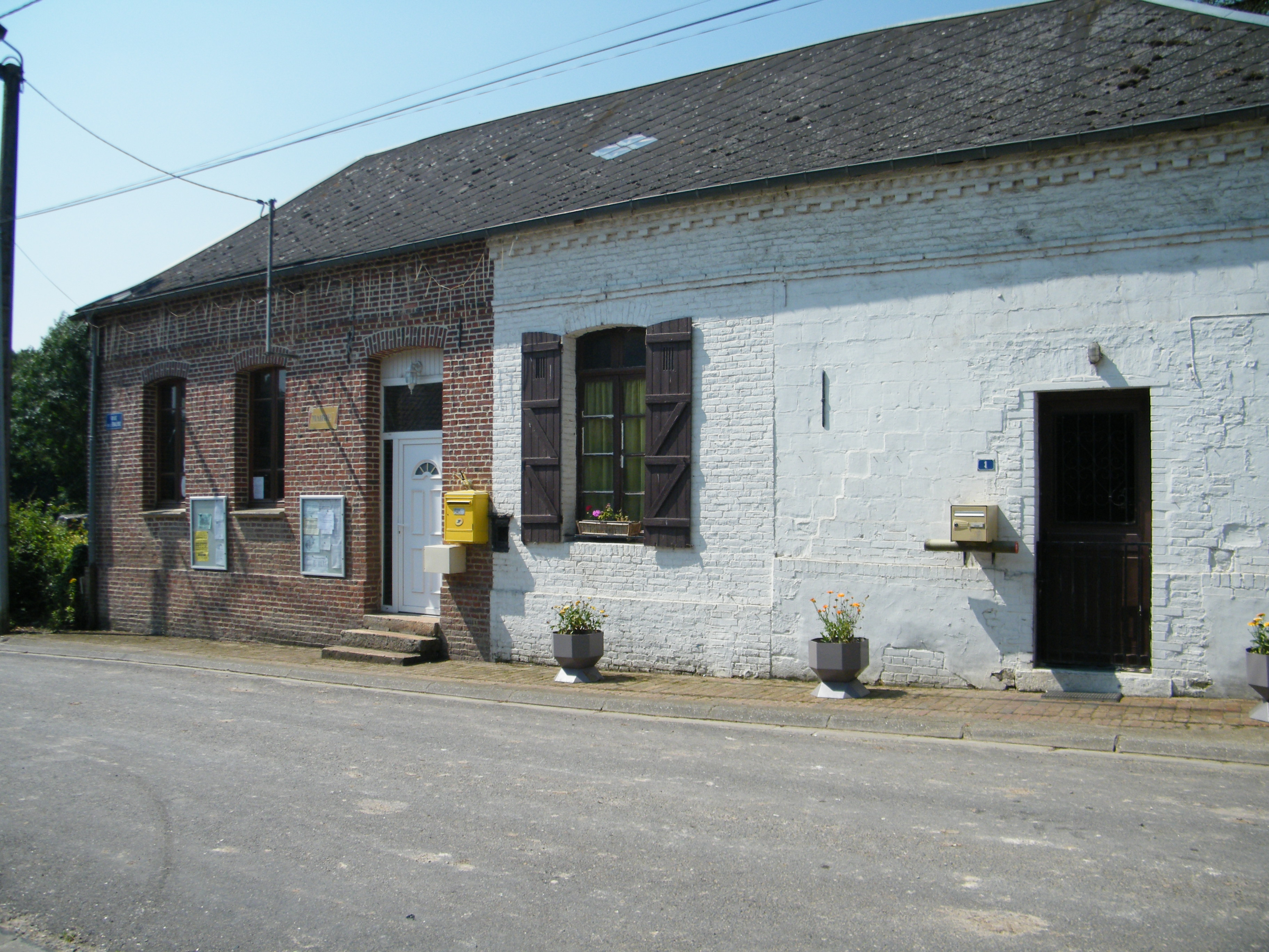 Mairie.